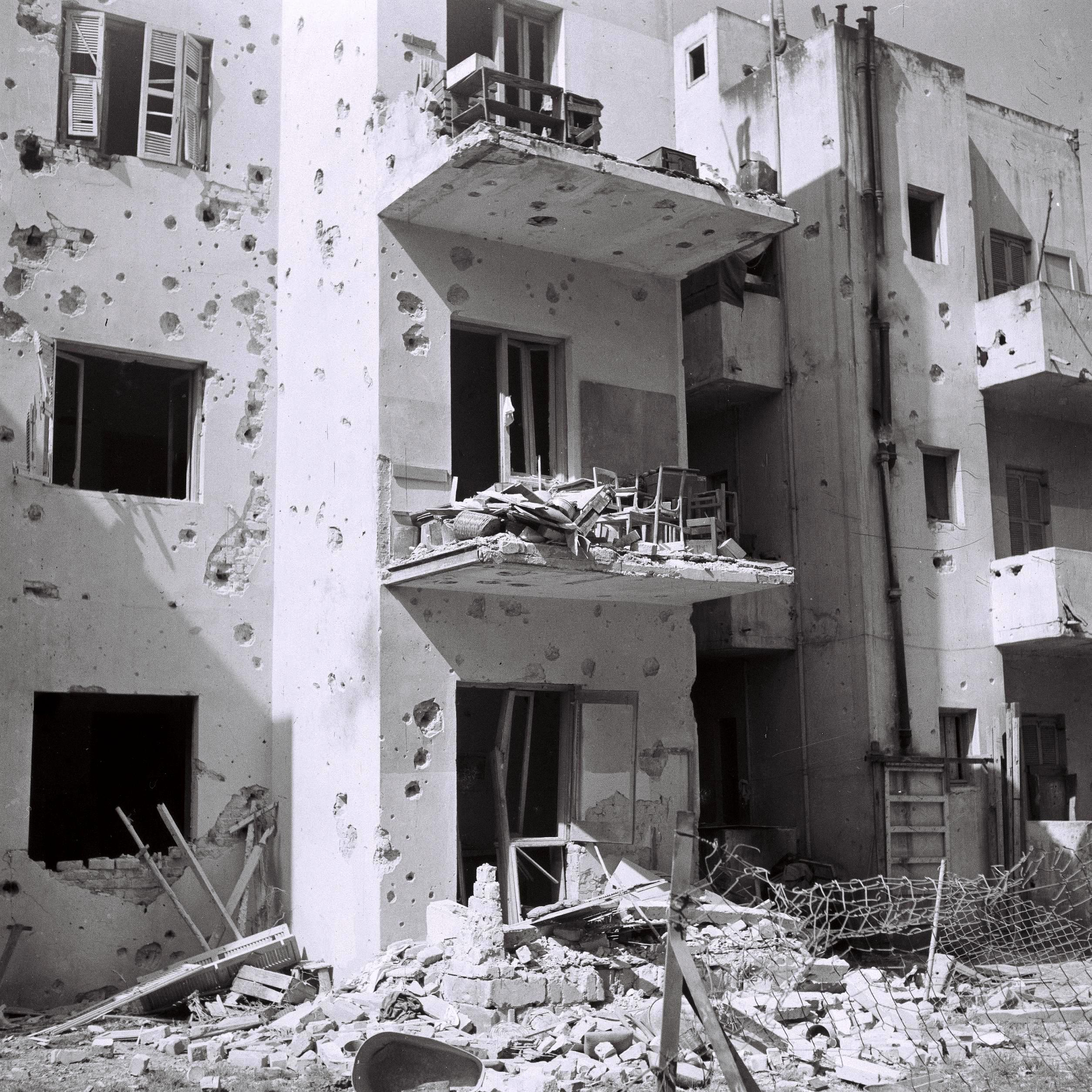 The War of Independence. In the photo, apartment houses damaged during the Egyptian air attack on Tel Aviv. מלחמת העצמאות. בתמונה: בתים הרוסים כתוצאה מהתקפת חיל האוויר המצרי על תל אביב